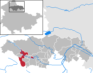 Ebeleben in Thuringia - Kyffhäuserkreis